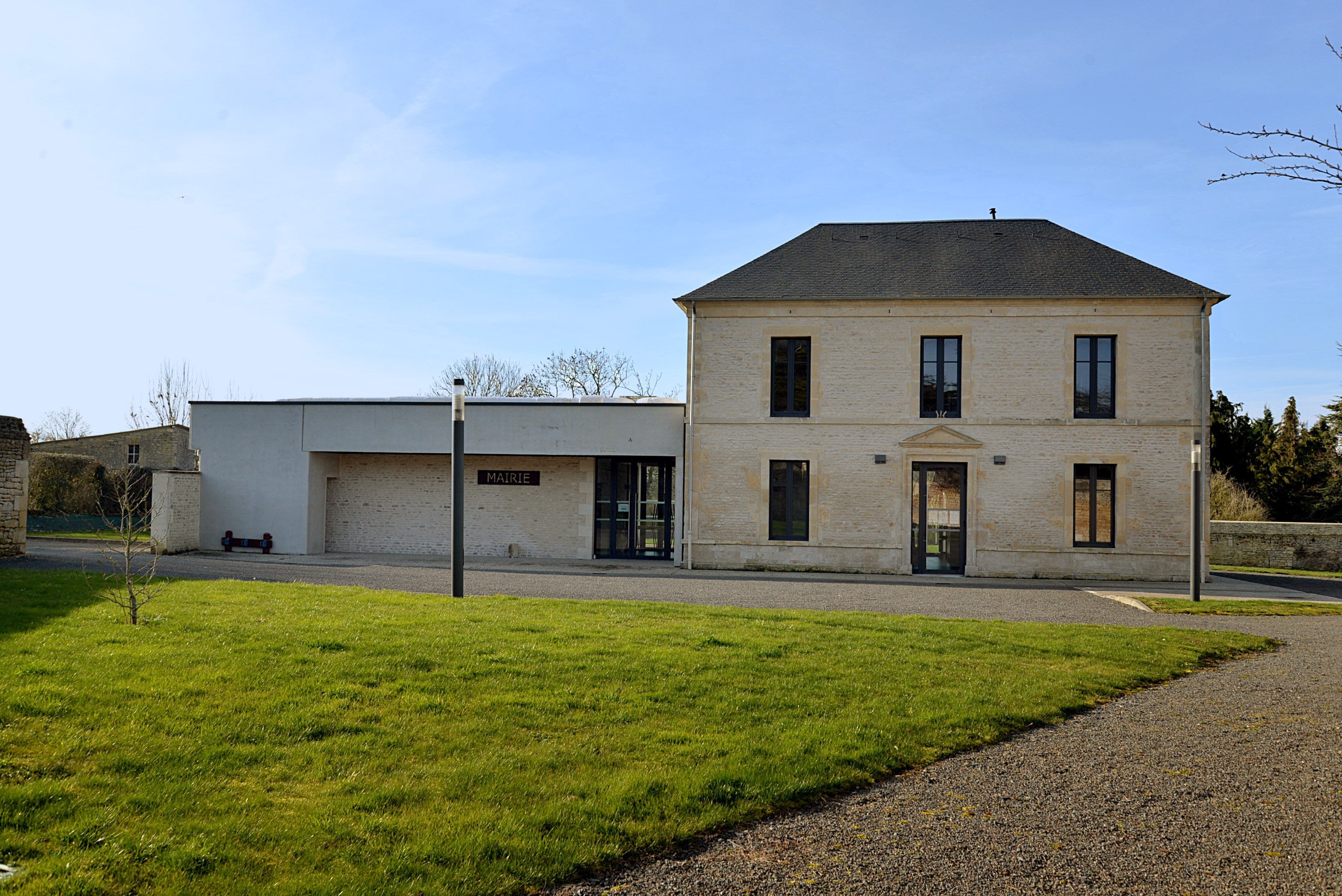 Cintheaux (14)